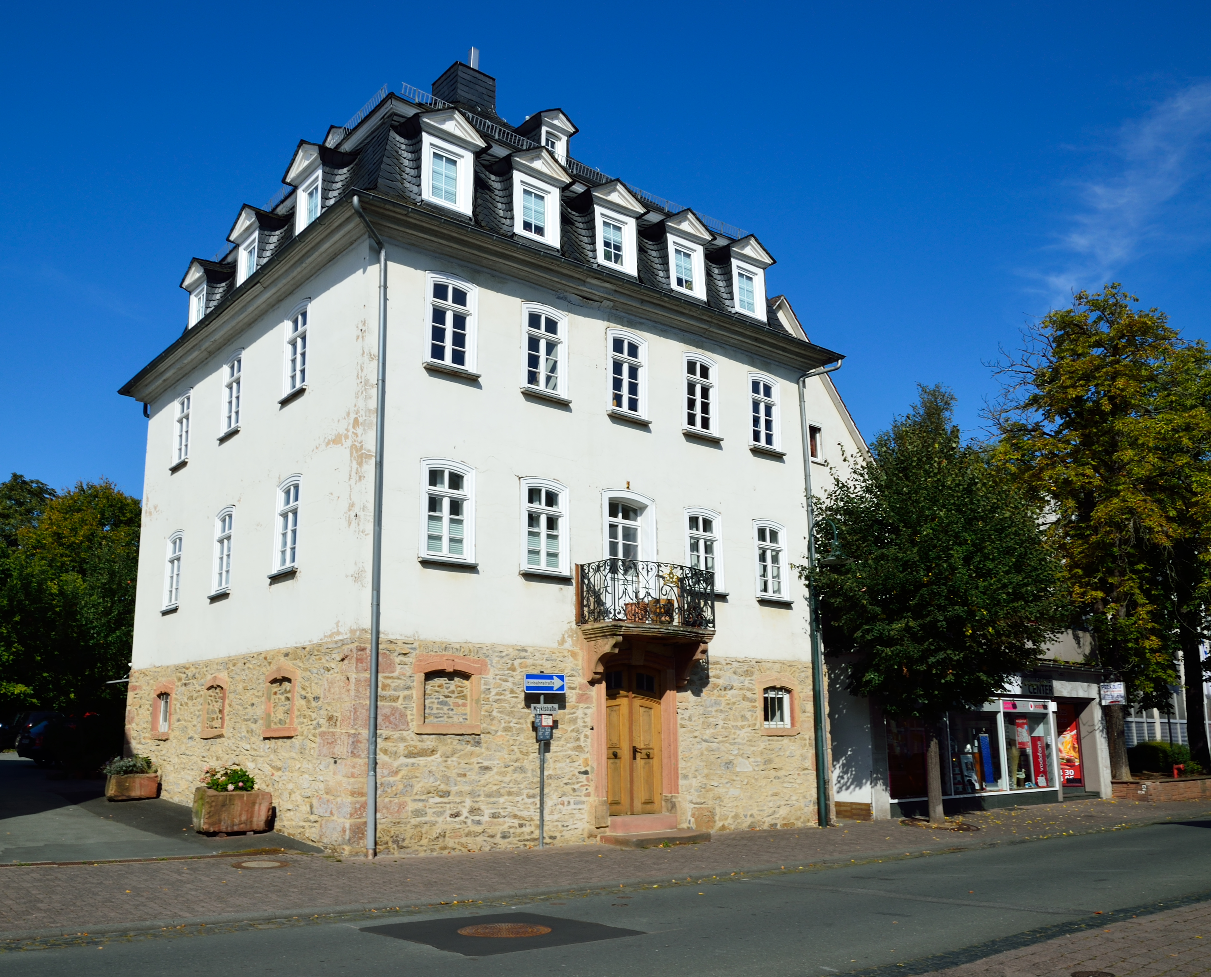 Haus Nr. 9 in der Marktstraße in Gladenbach